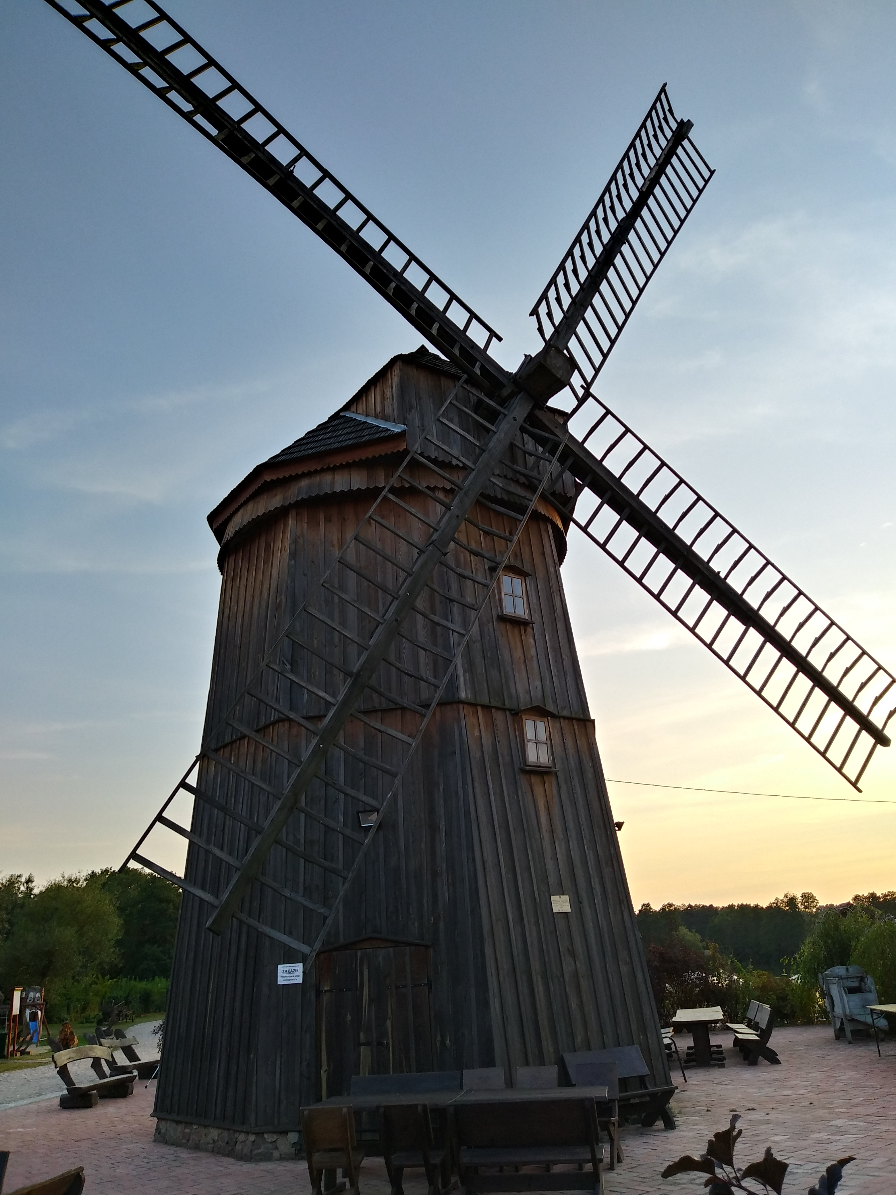 Jedna z atrakcji hotelu/skansenu "Olandia" - zabytkowy 160 letni wiatrak typu "Holender" - jeden z dwóch wiatraków o tej konstrukcji w Polsce. Przeniesiony z Niegocina k/Mławy